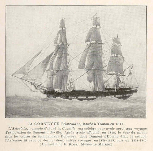 Corvette l'Astrolabe, lancee a Toulon en 1811 l'Astrolabe, nommee d'abord la Coquille, est celebre pour avoir servi aux voyages d'exploration de Dumont-d'Urville. Apres avoir effectue, en 1822, le tour du monde sous les ordres du commandant Duperrey, dont Dumont-d'Urville etait le second. l'Astrolabe fit avec ce dernier deux autres voyages, en 1826-1829, puis en 1838-1840.